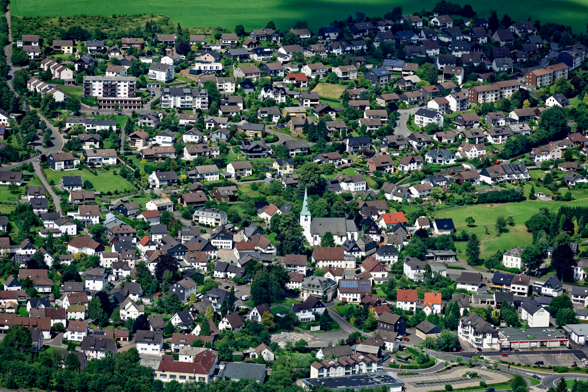 Luftaufnahme: Herscheider Ortskern mit der evangelischen Apostelkirche, Nordrhein-Westfalen.